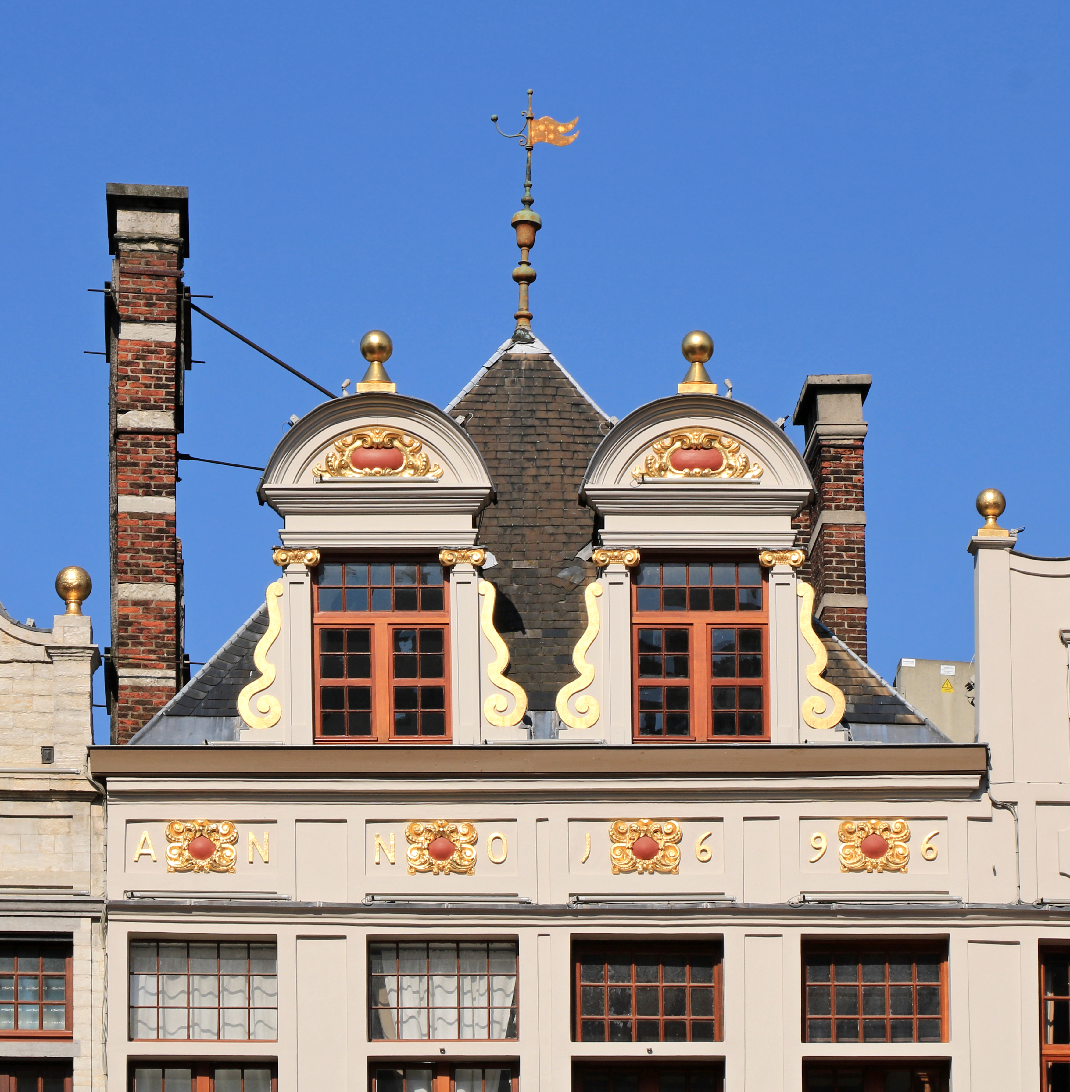 Belgique - Bruxelles - Grand-Place n° 36-37 - Maison du Petit Renard et du Chêne This photo of immovable heritage has been taken in the Brussels Capital Region